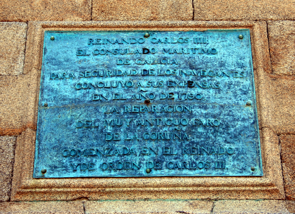 Placa na Torre de Hércules testemuñando a reforma da época de Carlos III, en castelán. En outro lado da torre hai unha inscrición igual redactada en latín.